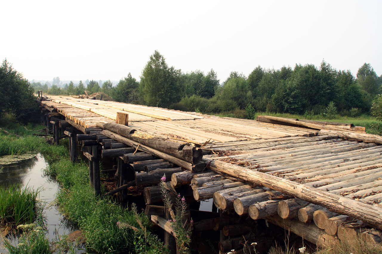 Рымы. Мост через р. Черный Лух. 2010